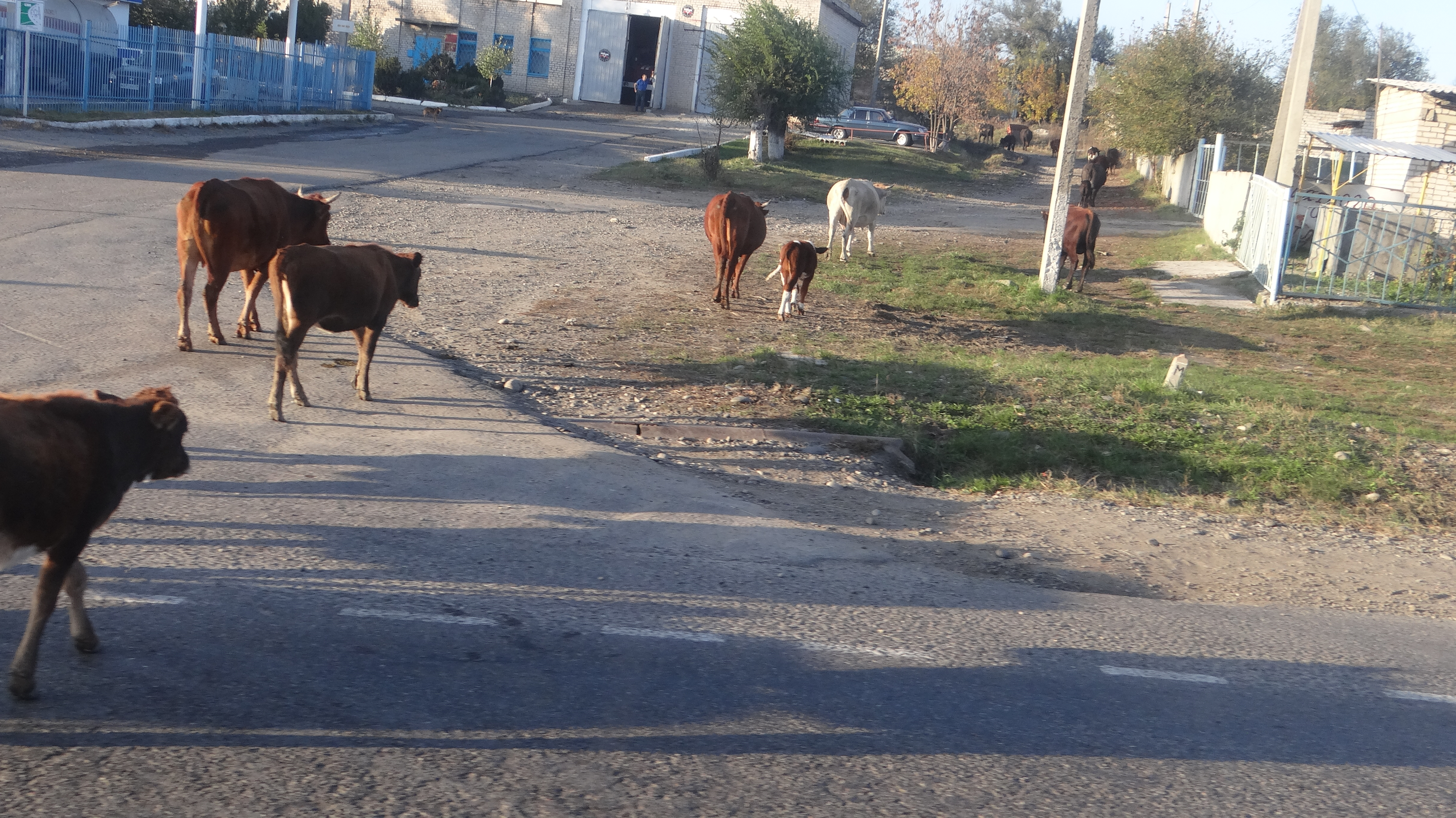 Kavkazskiy, Karachaevo-Cherkesskaya Republits, Russia, 369100